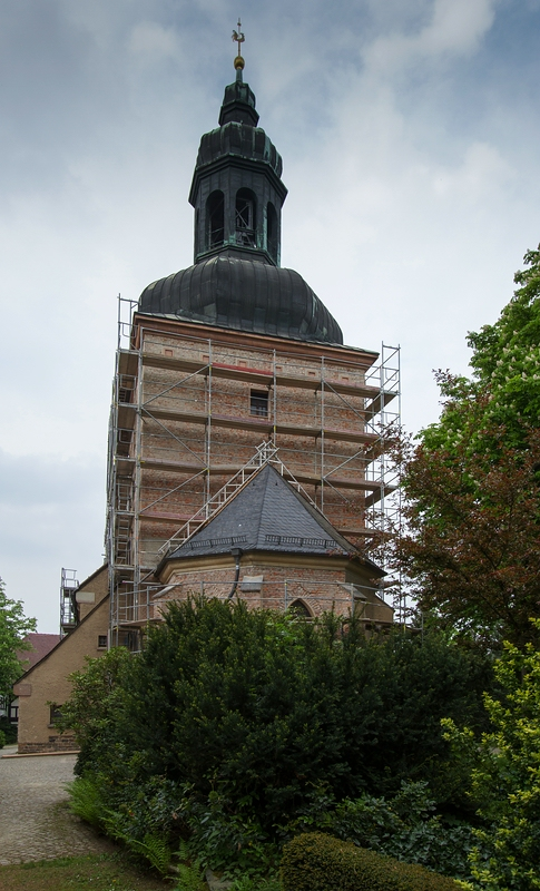 Glösa_Sankt_Jodokus_Kirche